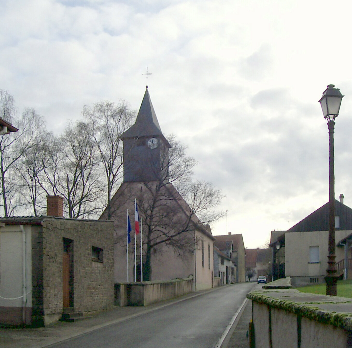 L'église protestante d'Altwiller